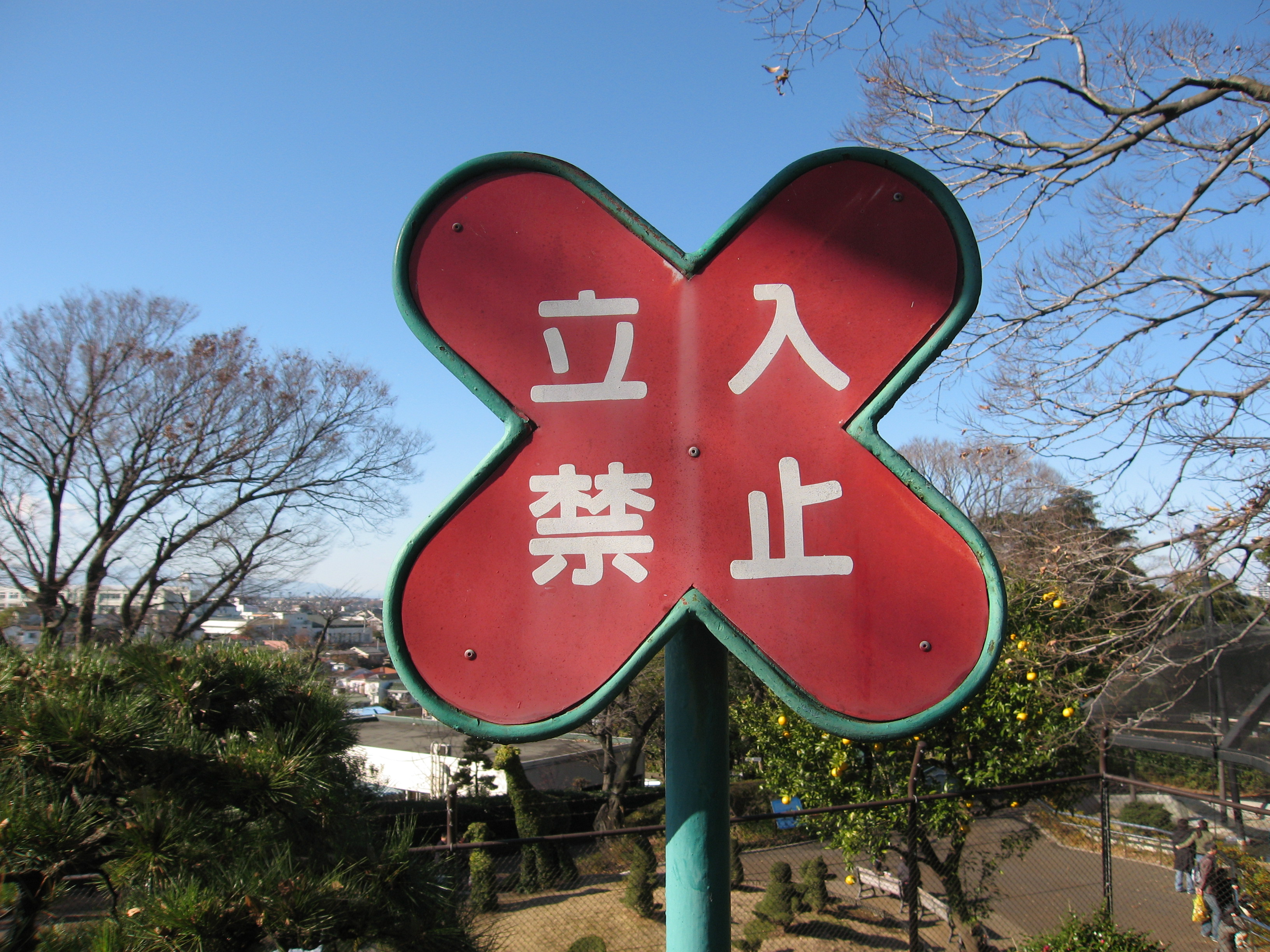 "Sign" Nogeyama Park (design by Sori Yanagi 1970) , Yokohama, Japan